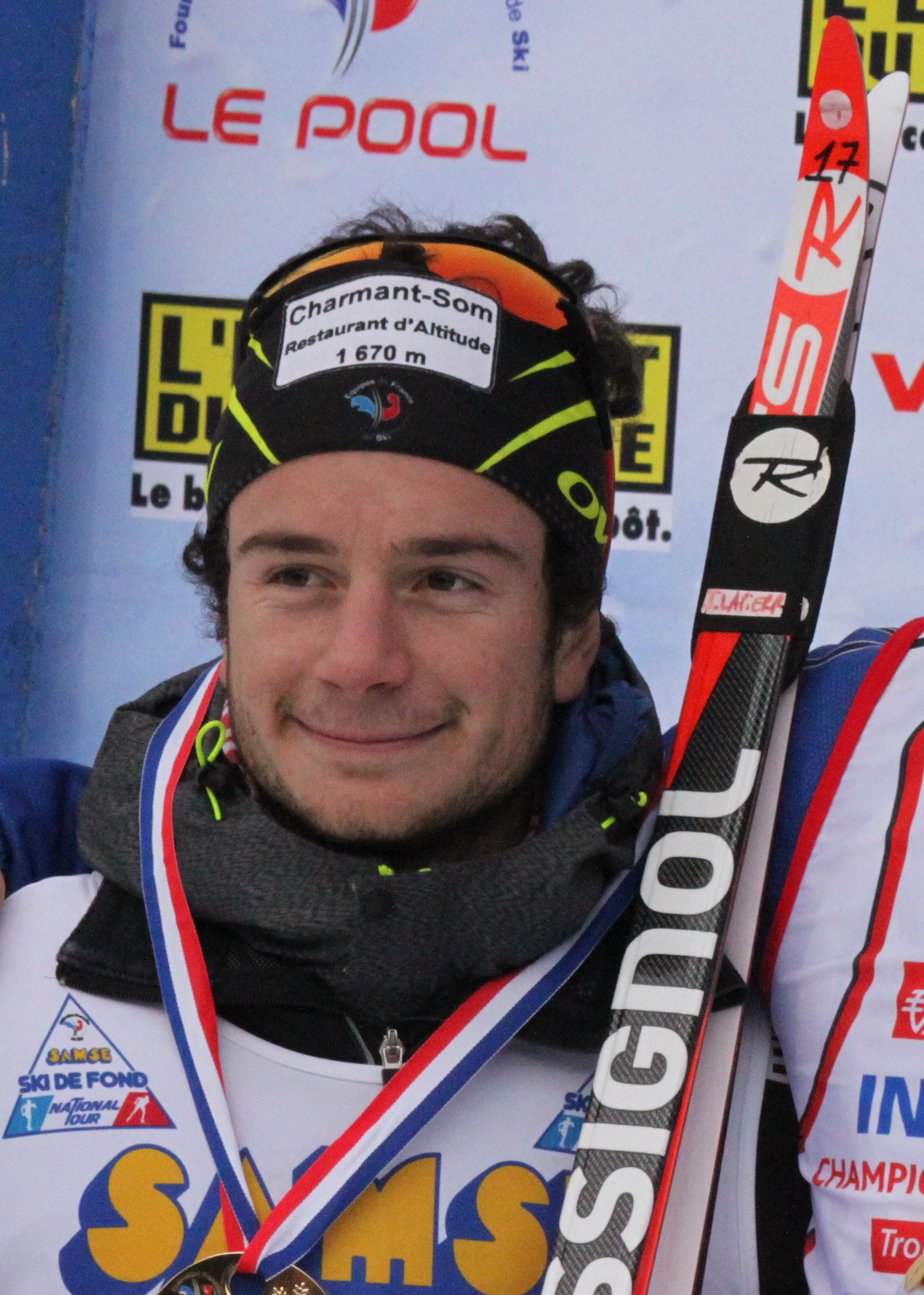 Jules sur le podium de la coupe de France à Bessans en Janvier 2016